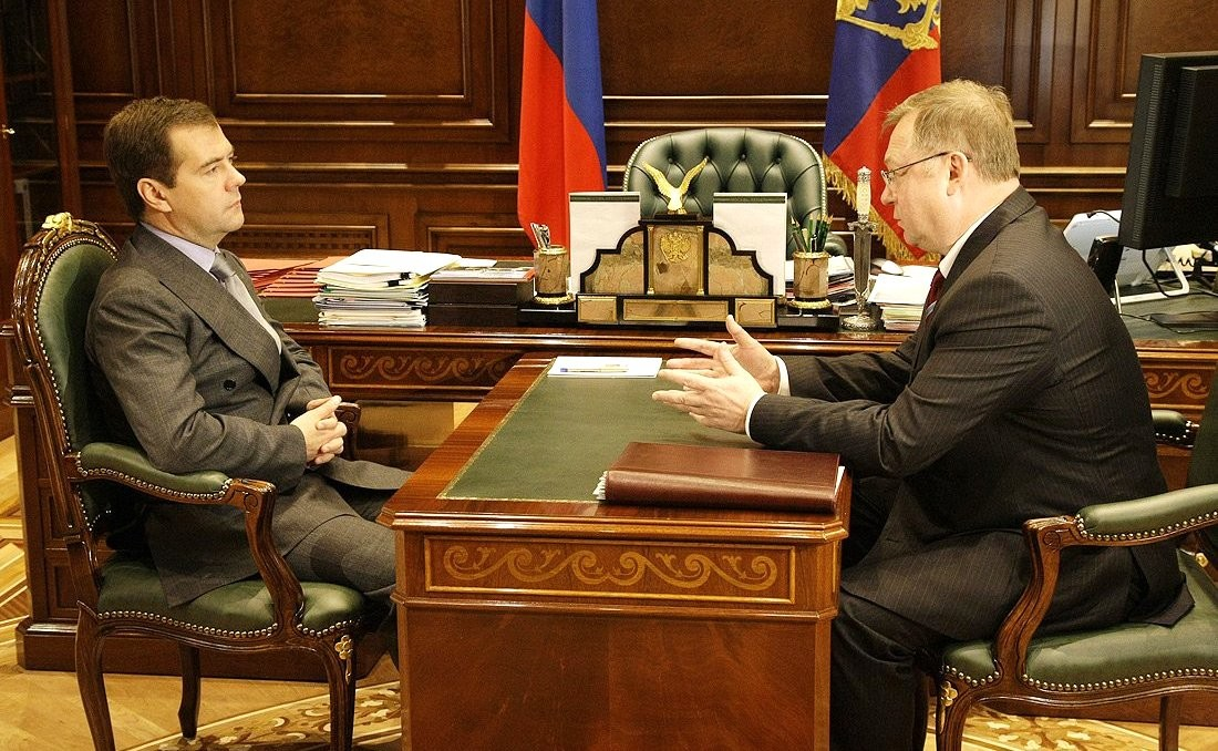 Сергей Степашин